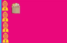 Прапор Кам‘янсько-Дніпровського району